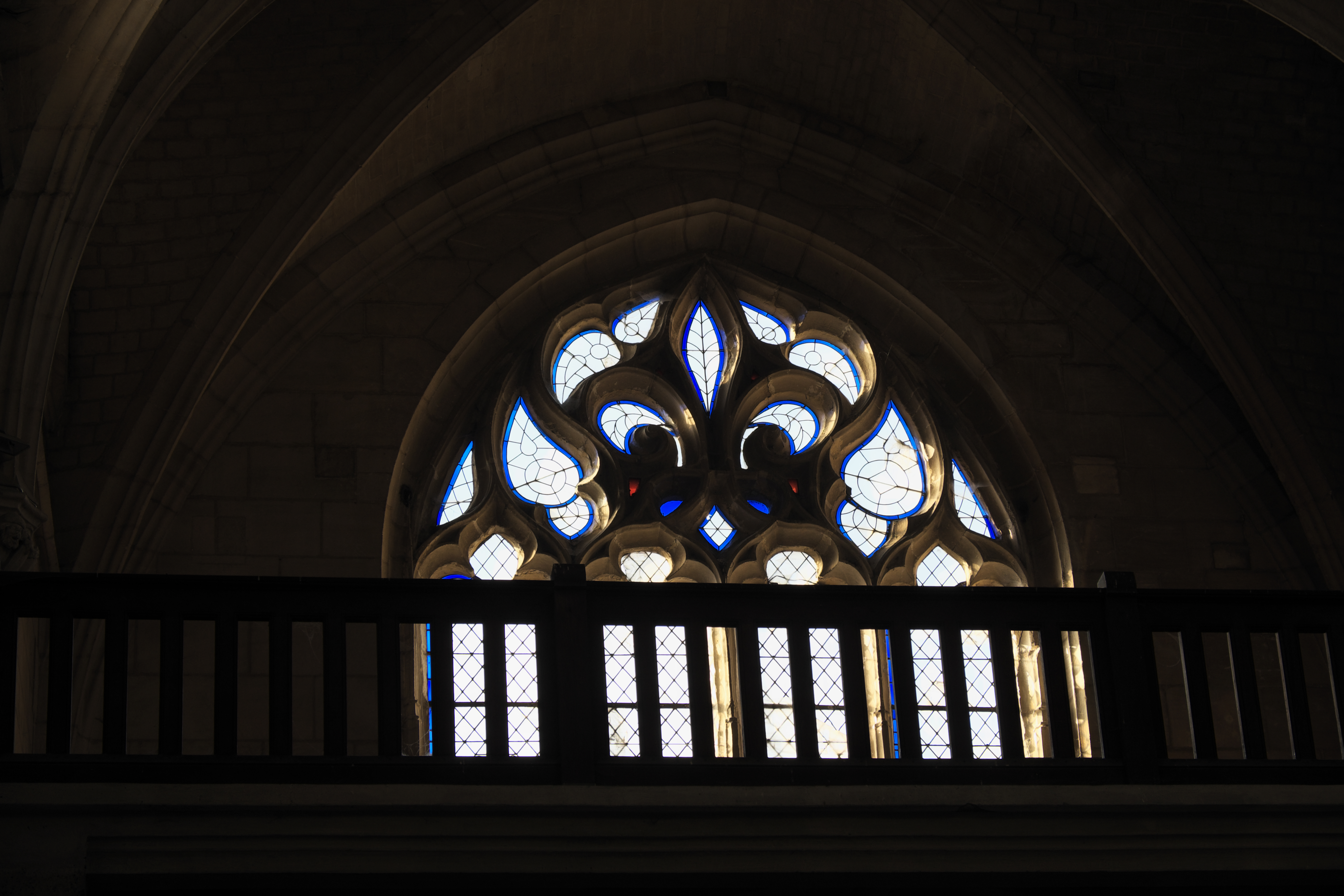 Katholische Pfarrkirche Saint-Gervais-Saint-Protais in Bessancourt im Département Val-d’Oise (Île de France/Frankreich), Fenster der Westfassade mit Darstellung einer Lilie im Maßwerk